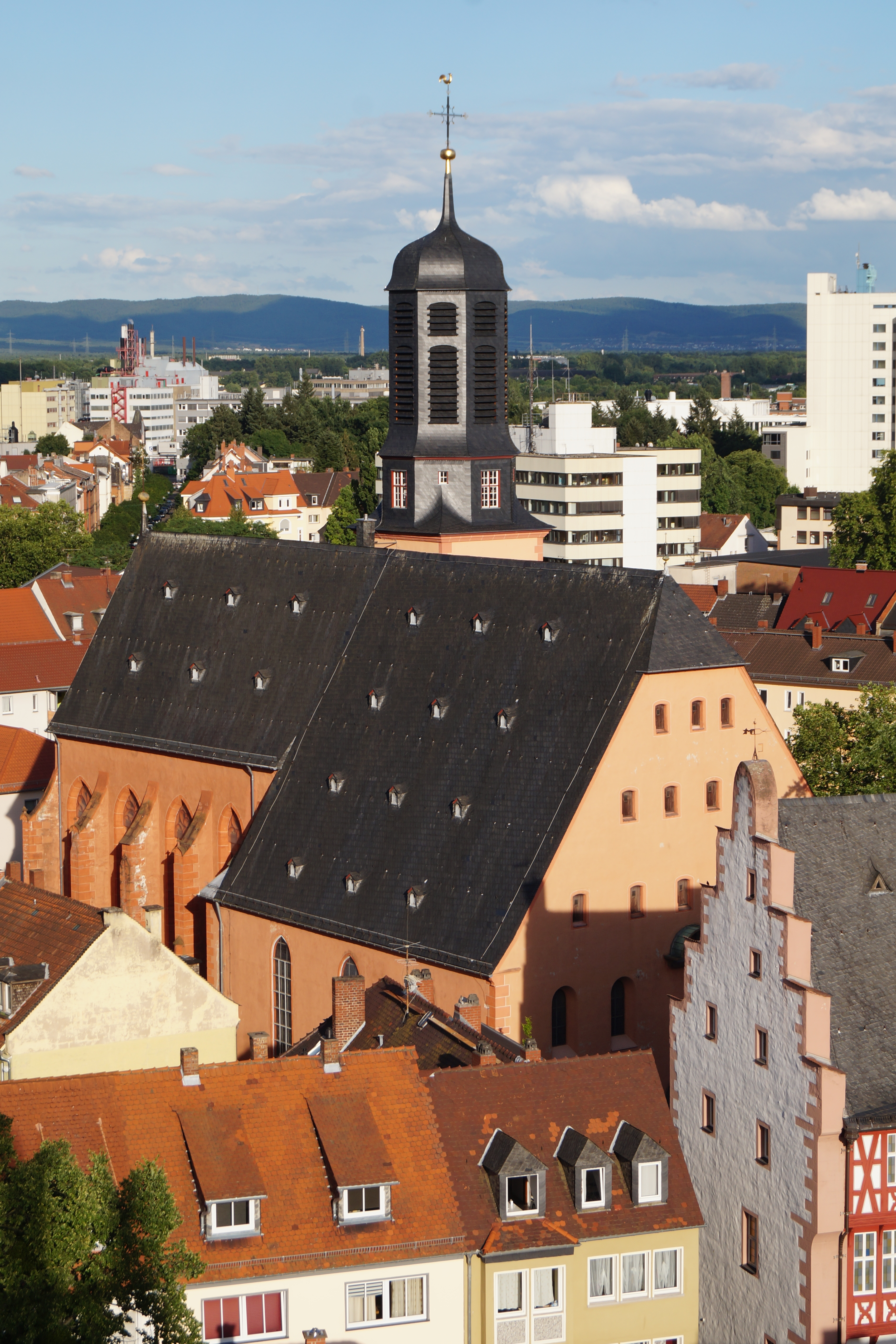 Ansicht der Marienkirche in derHanauer Altstadt, Blick vom Turm der alten Johanneskirche